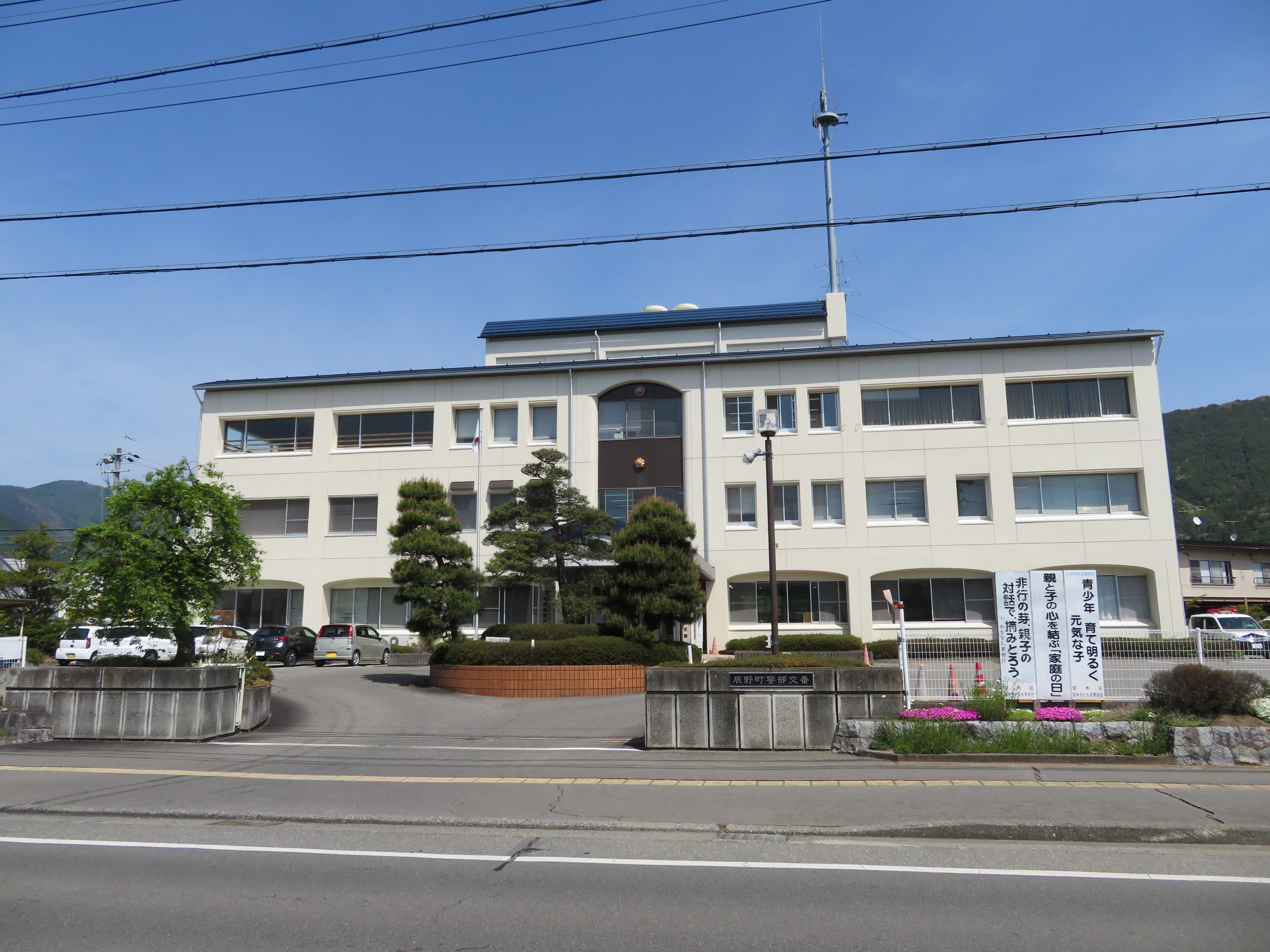 伊那警察署辰野町警部交番庁舎 Canon PowerShot SX720 HS